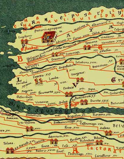 Table de Peutinger - Ouest de la Gaule - fac similé konrad miller de 1887